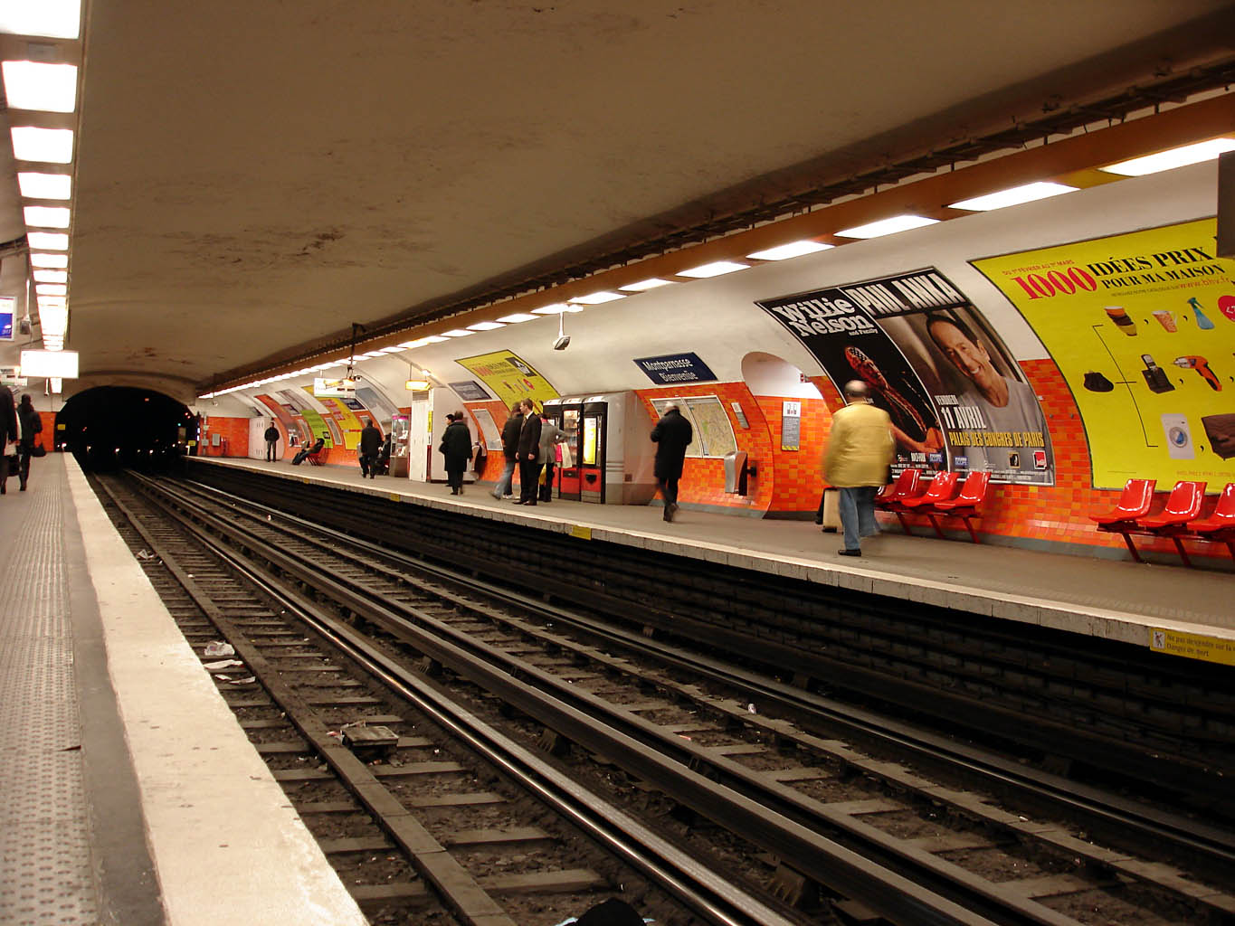 Métro de Paris (France) - ligne 6 - Station Montparnasse - Bienvenüe